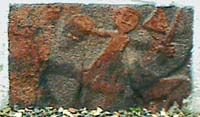 Figur i fundamentsten i Beder kirke - eget foto